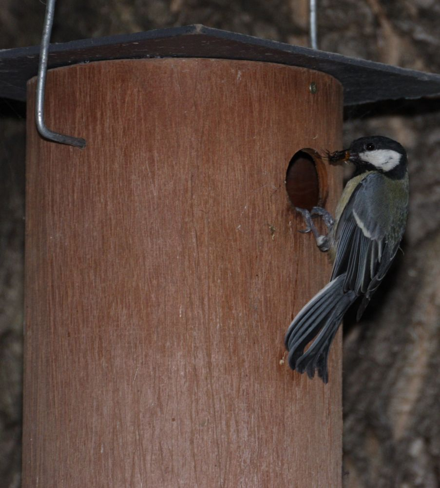 Széncinege mesterséges madárodúnál (Nagycenk)